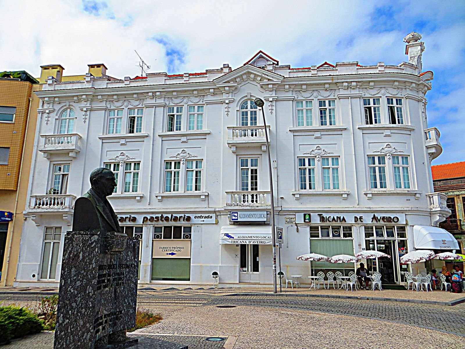 Av. Dr. Lourenco Peixinho